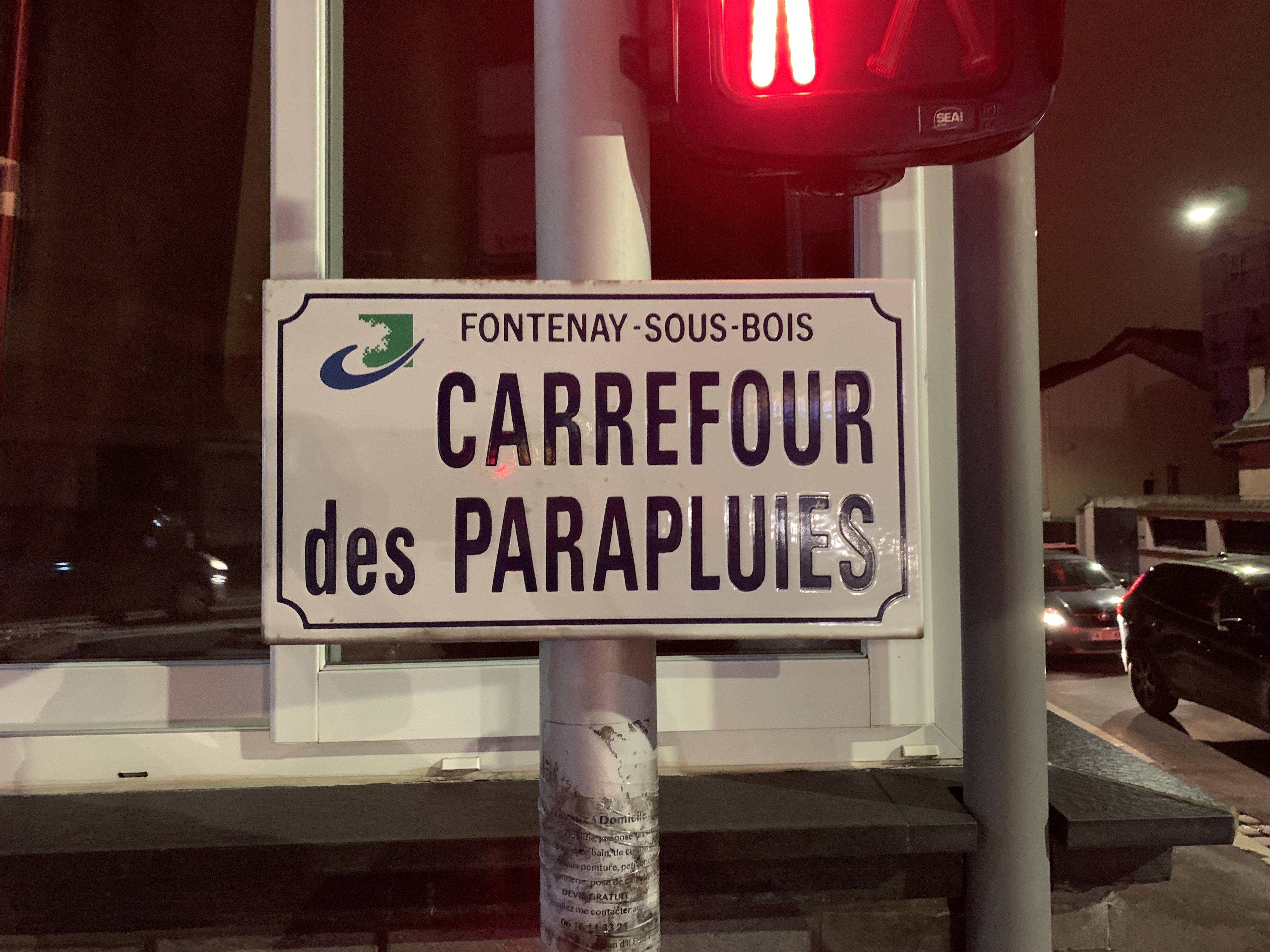 Plaque du carrefour des Parapluies, Fontenay-sous-Bois.